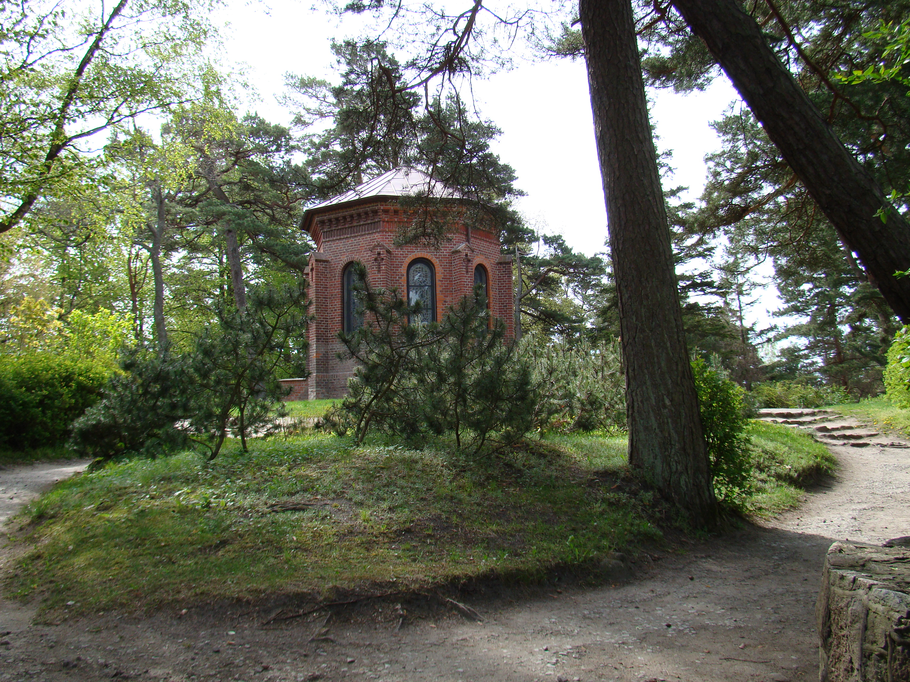 Birutės kalno koplyčia.